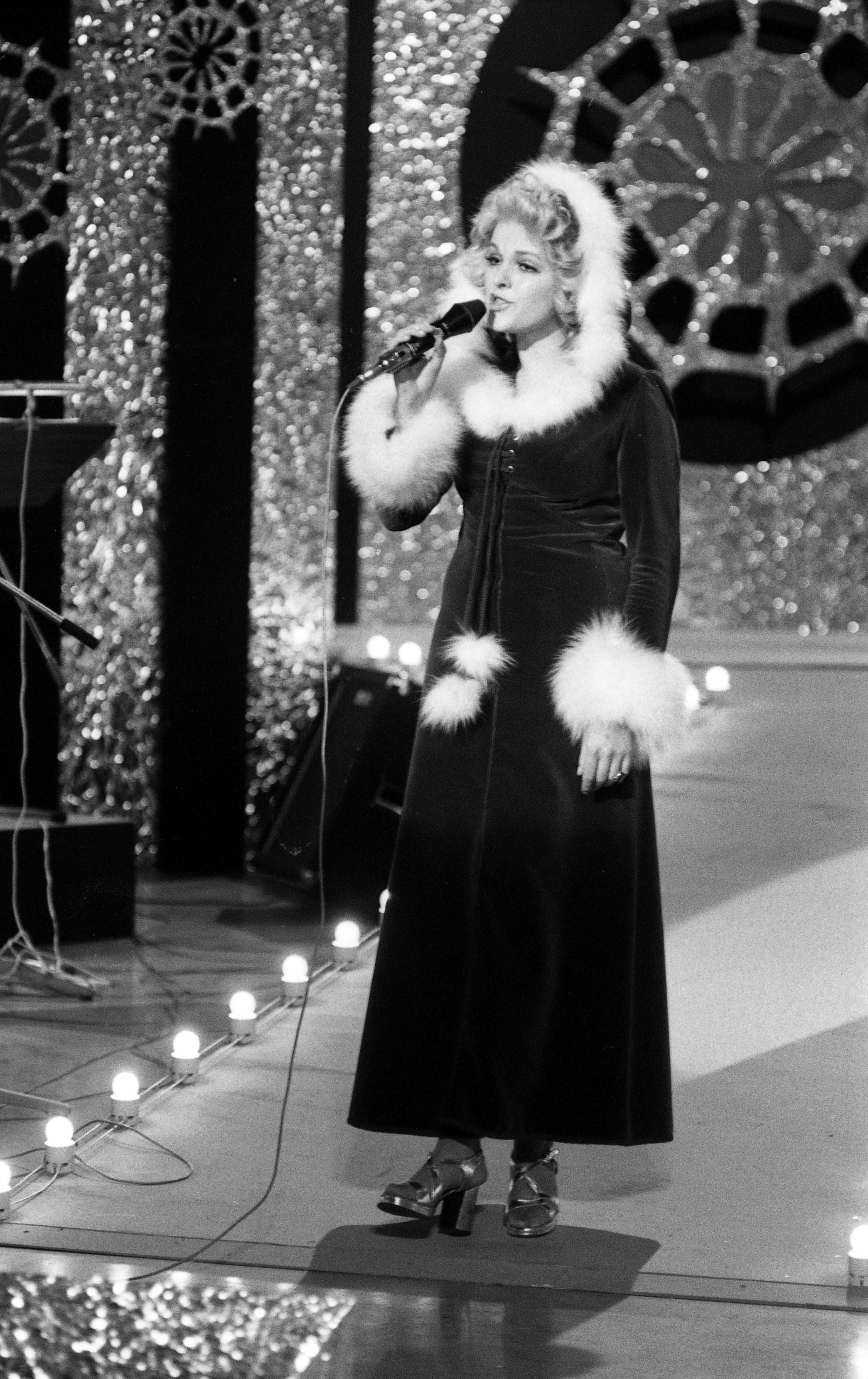 Melodi Grand Prix, norsk finale i TV-studio 1 NRK, 1974. Fra generalprøven. Foto: Petter R. Iversen. Arkivref.: PA-0797_U_7631_014_034